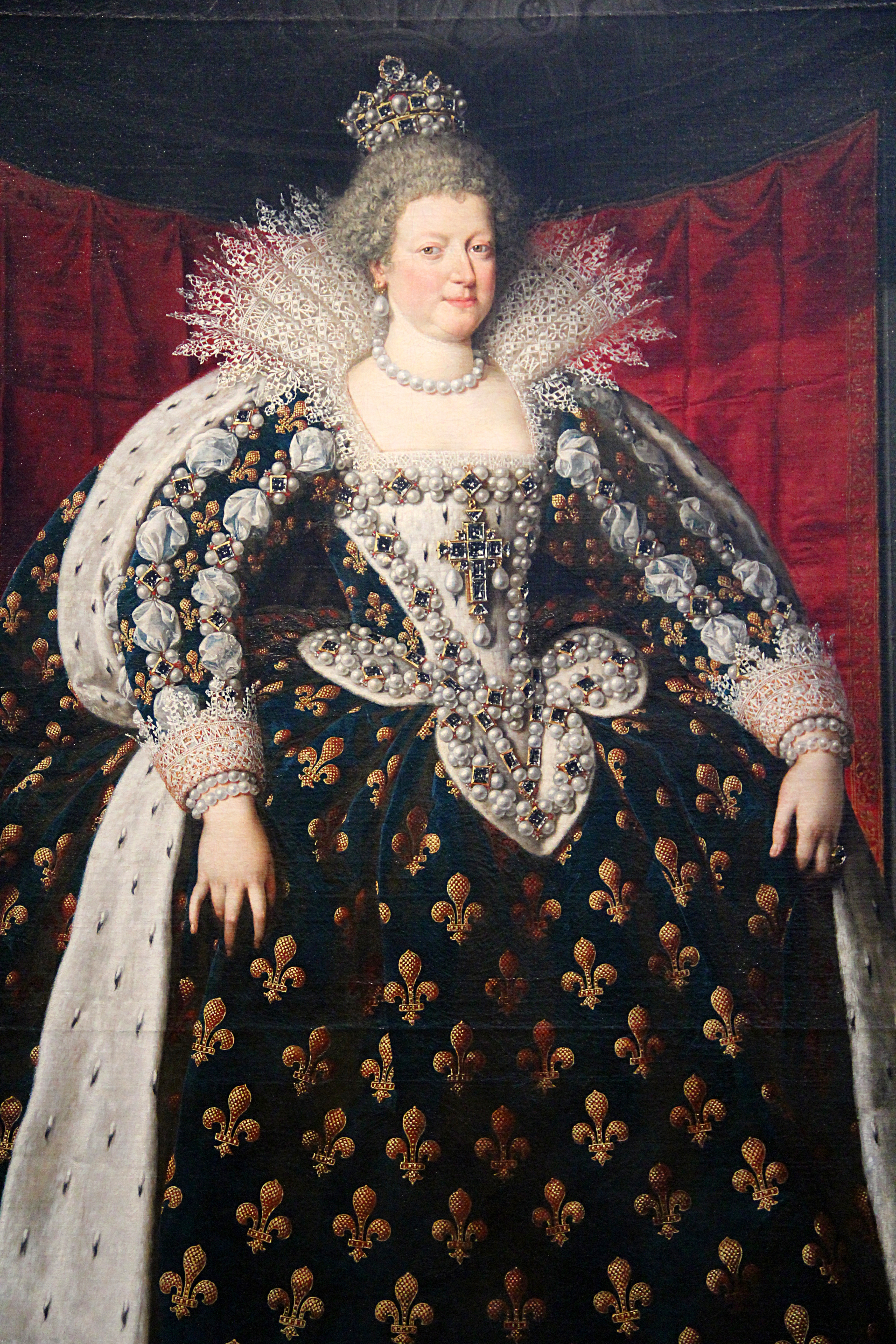 Marie de Médicis en costume d’apparat (robe aux manches crevées avec le col de dentelle « à la Médicis », corsage de soie blanche orné de pierreries et de perles, manteau royal en velours de soie bleu orné de semis régulier de fleurs de lys dorées, doublure d’hermine mouchetée, cape posée sur les épaules) sous un dais d’honneur rouge.